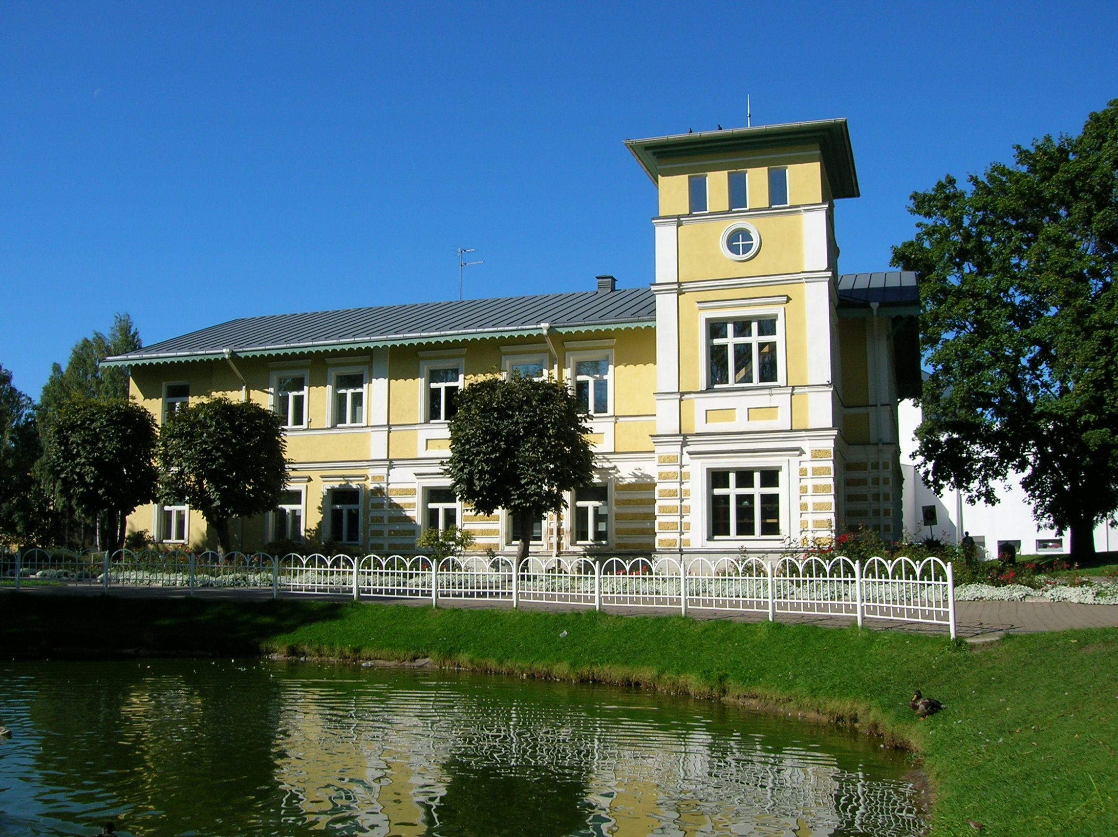 Valga KRK tiigiga